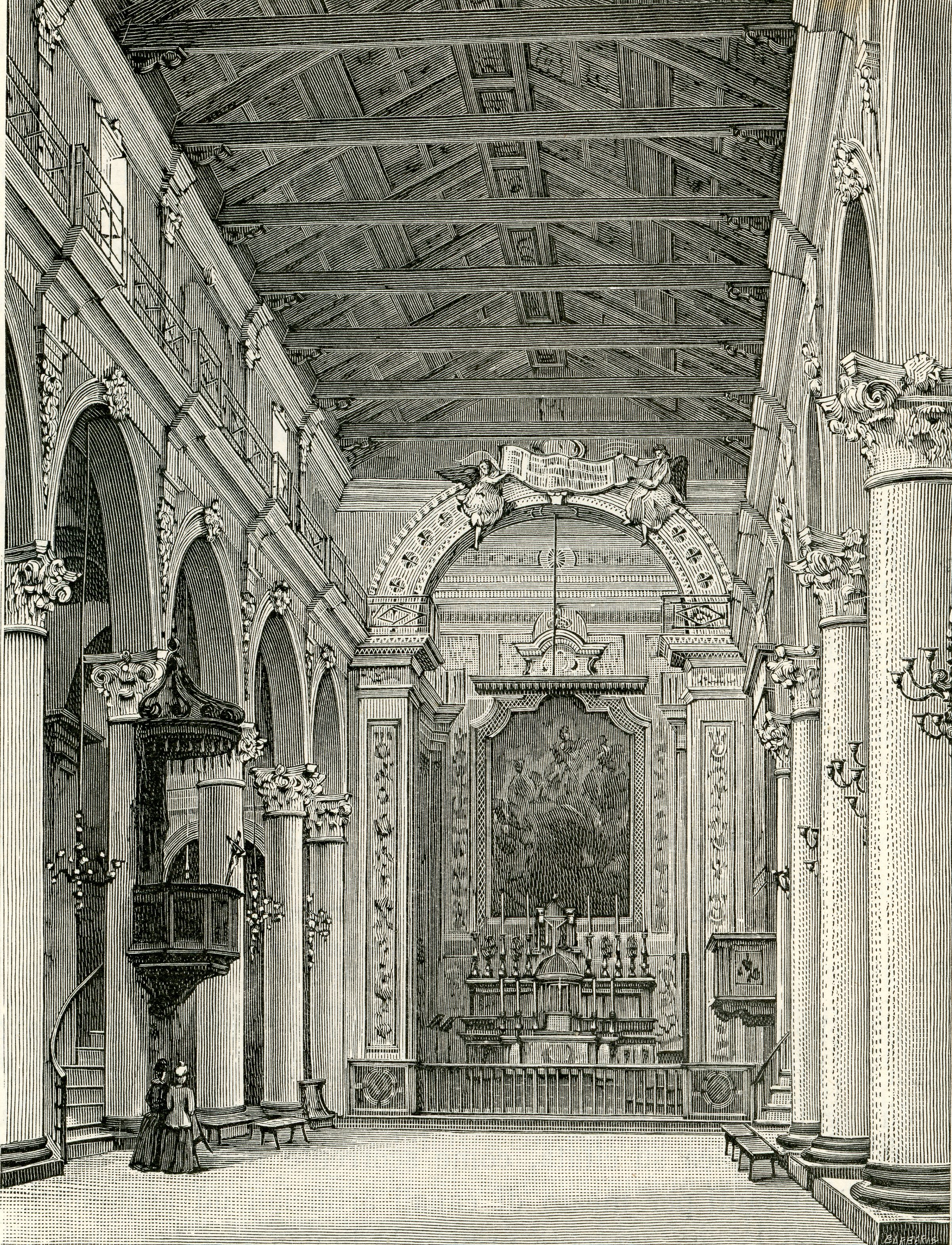 Modica: interno della chiesa di S. Maria di Betlemme (xilografia di Barberis 1892).